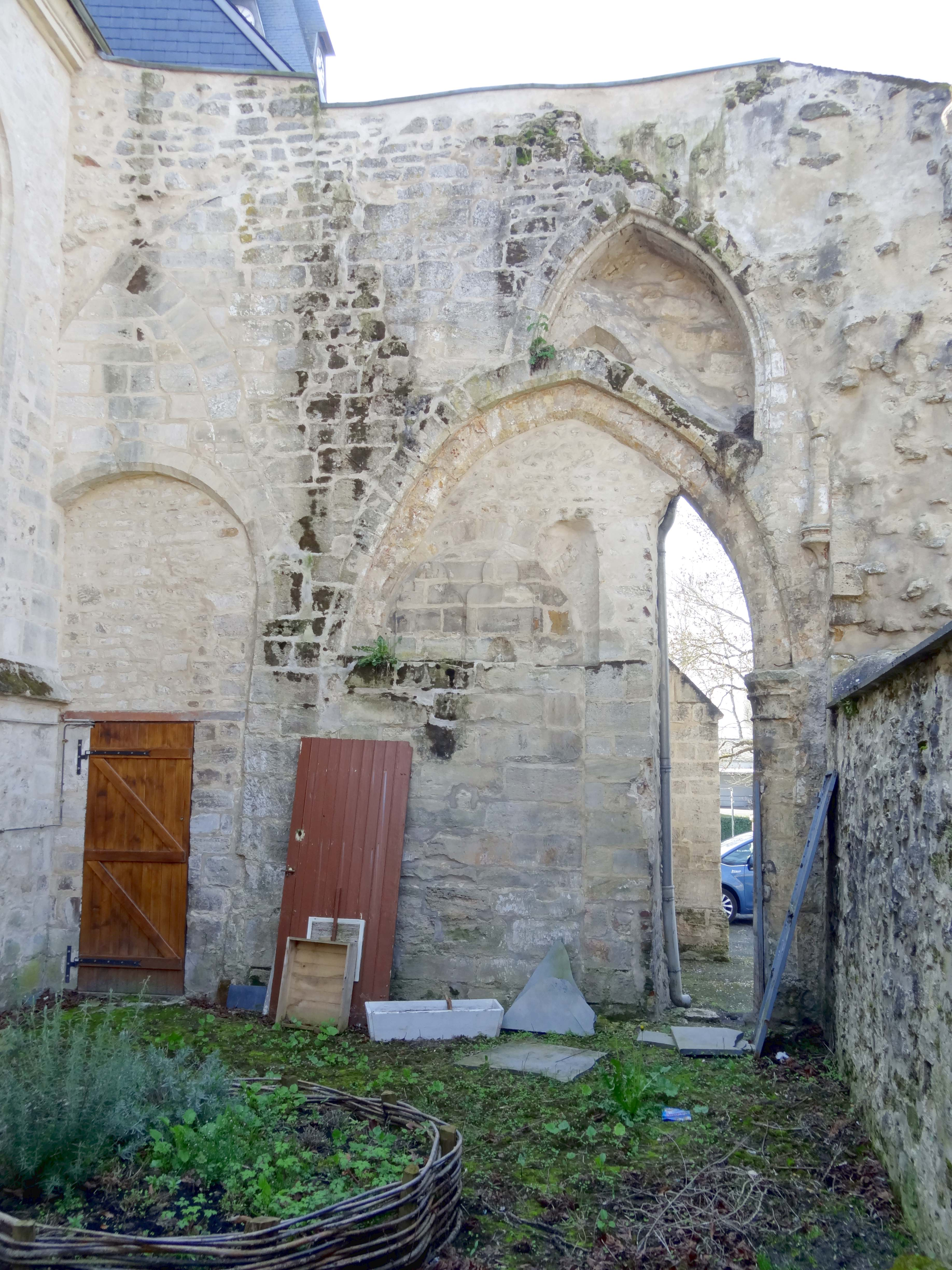 Intérieur de l'église - voir titre.